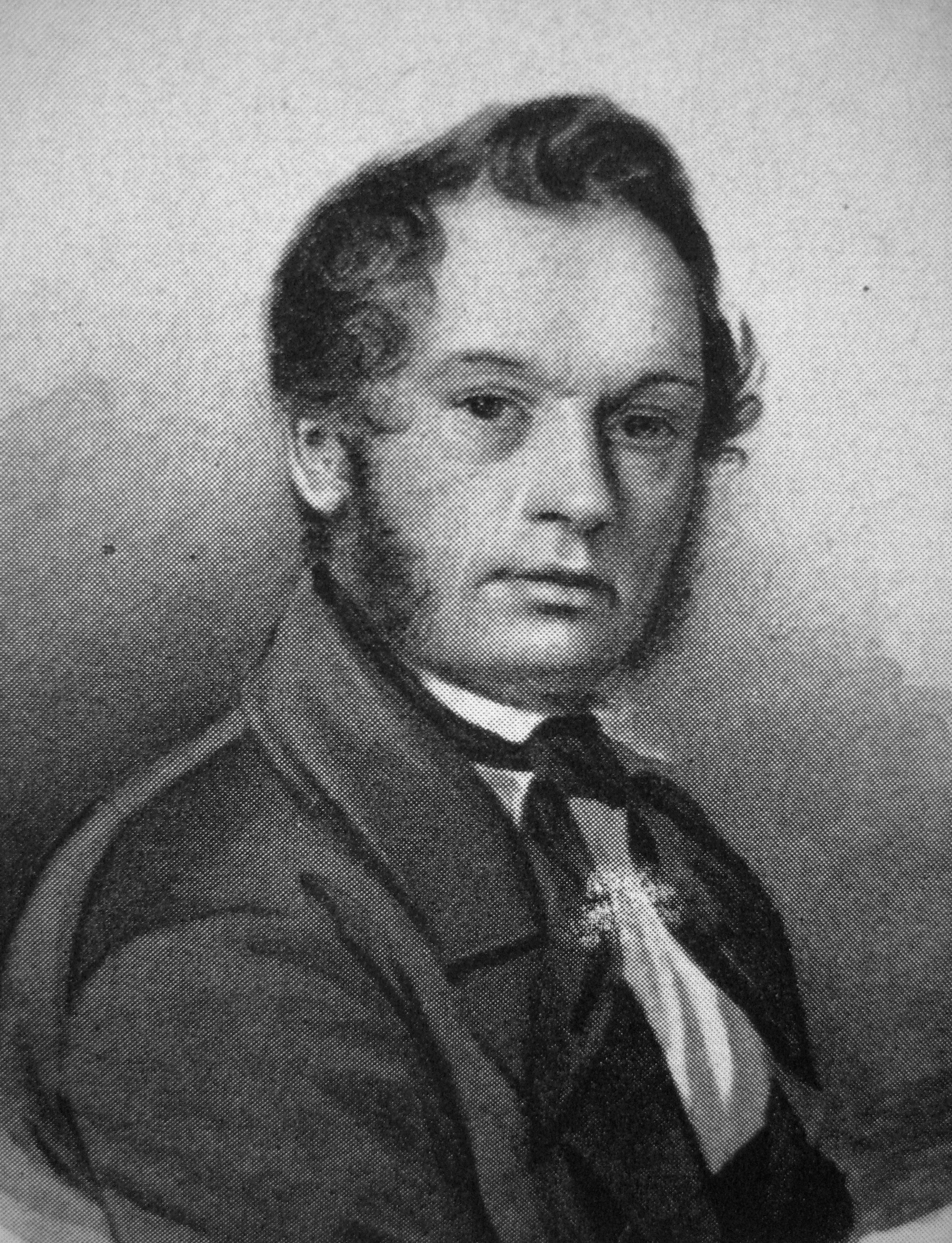 Автопортрет